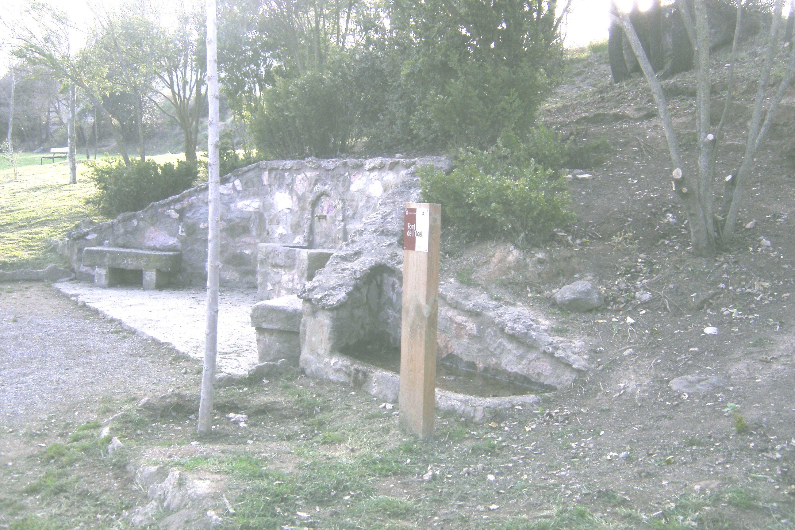 La font de l'Ocell, al municipi de Solsona (Solsonès). Vista general de la font de del sud-est.